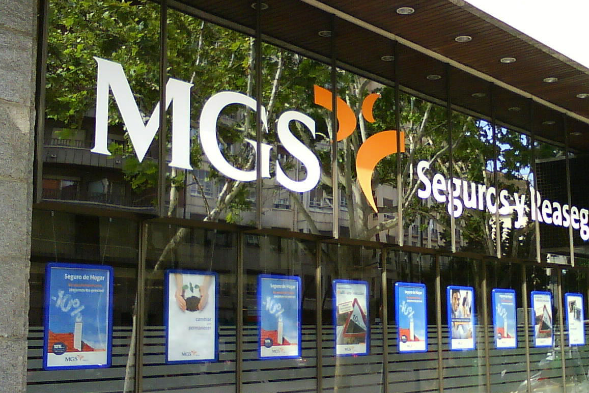 Sede social de MGS Seguros en Zaragoza